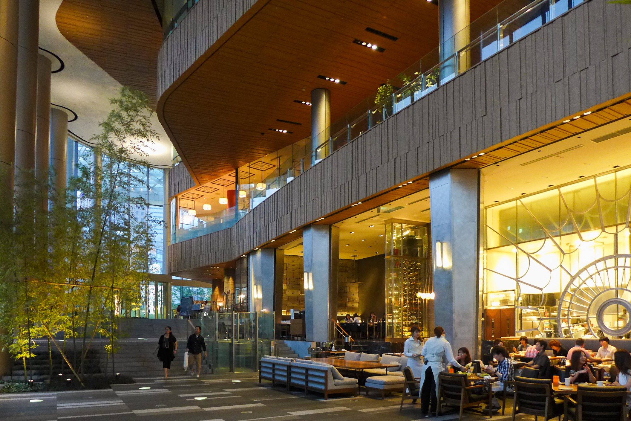 Toranomon Hills Atrium